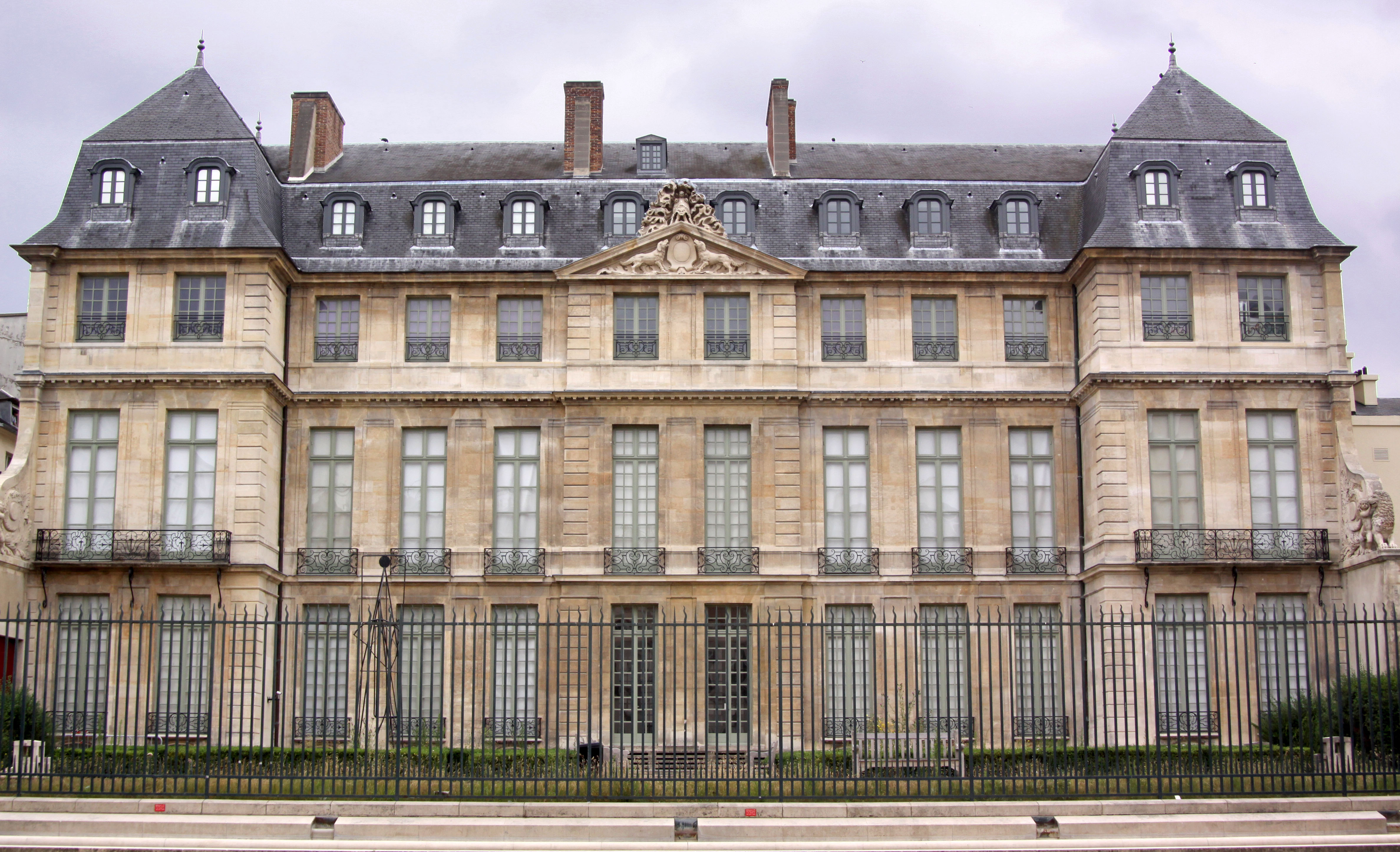 Paris. La facade arrière de l'Hôtel Salé.